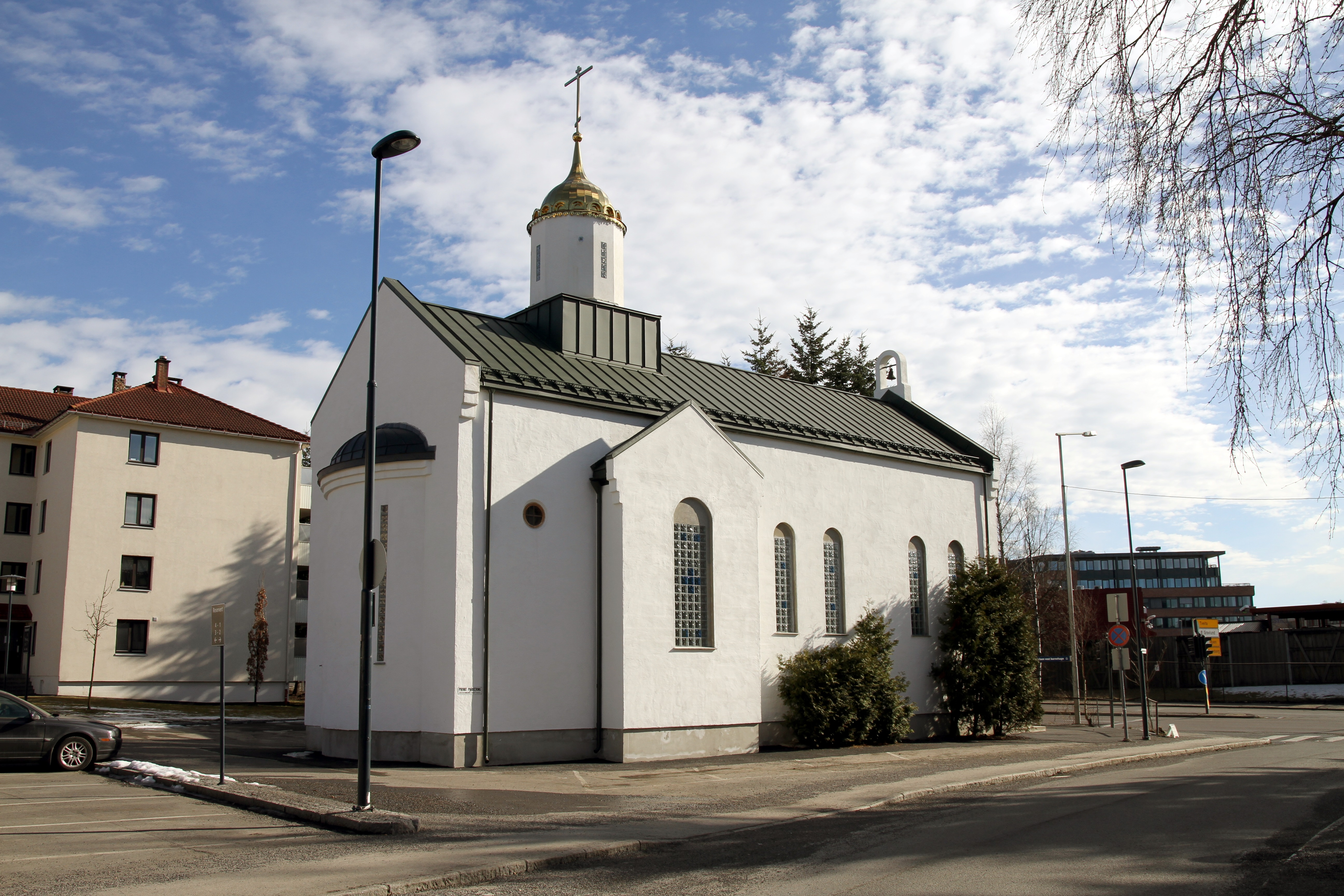 Hellige Nikolai kirke